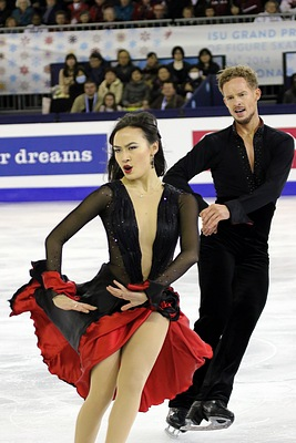 Мэдисон Чок и Эван Бейтс (США) на финале Гран-при по фигурному катанию 2014-2015.